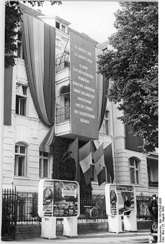 Berlin, Rumänische Botschaft, festlich geschmückt Zum 6. Jahrestag der Befreiung Rumäniens wurde das Gebäude der Rumänischen Diplomatischen Mission in Berlin-Pankow festlich geschmückt. Aufn.: Illus T 113 22.8.50 Leu.